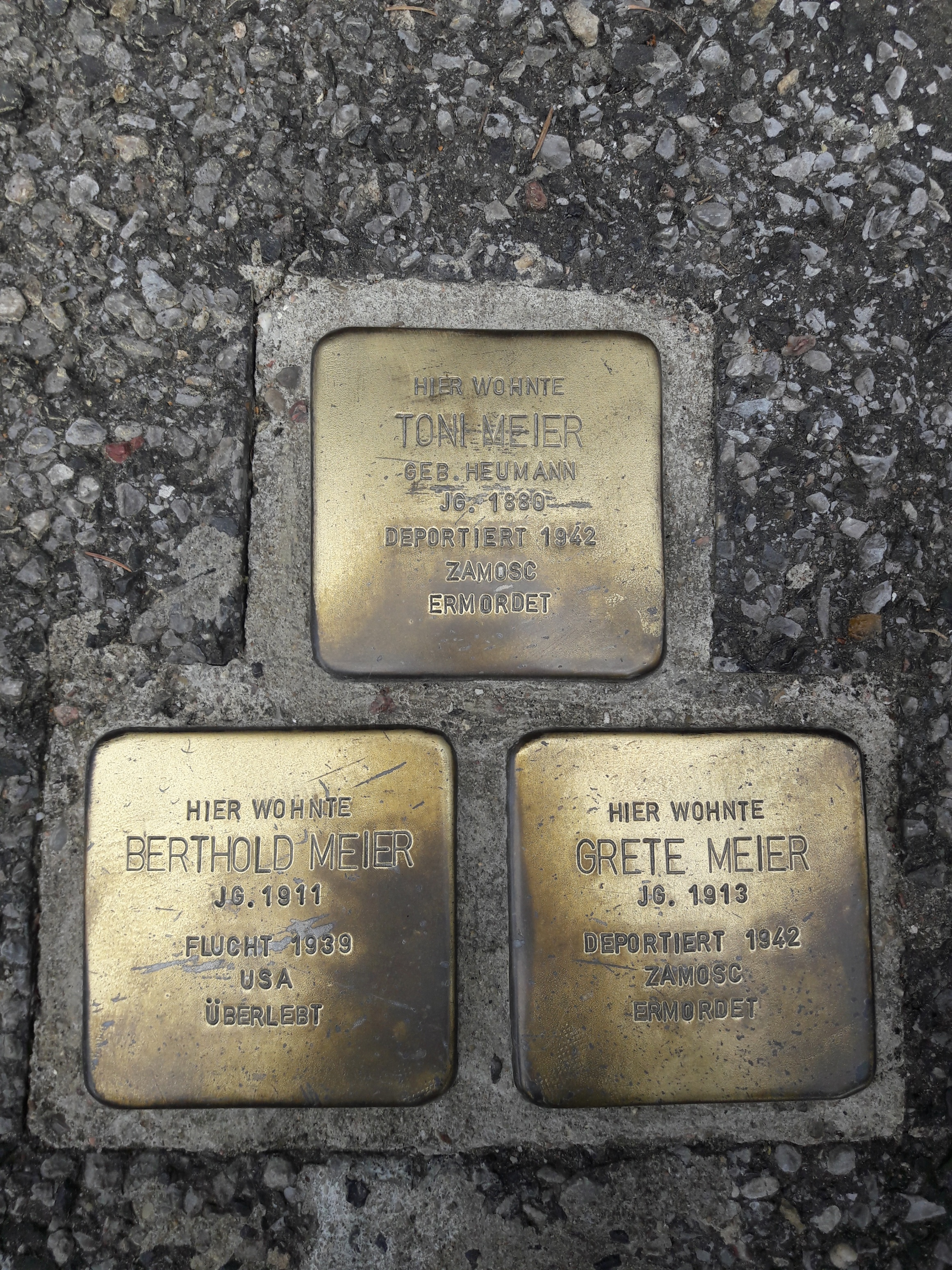 Stolpersteine Lindenweg 3, Kreuztal-Littfeld